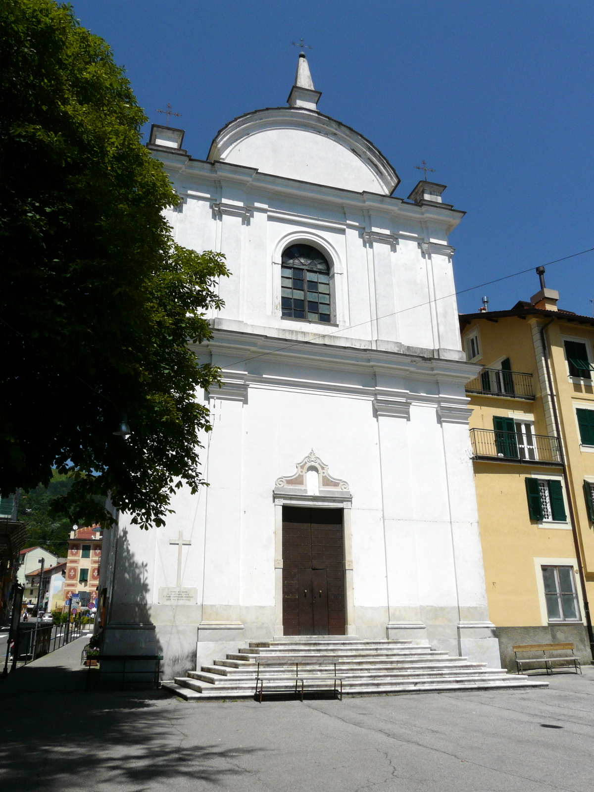 L'oratorio di San Vincenzo, Torriglia, Liguria, Italia